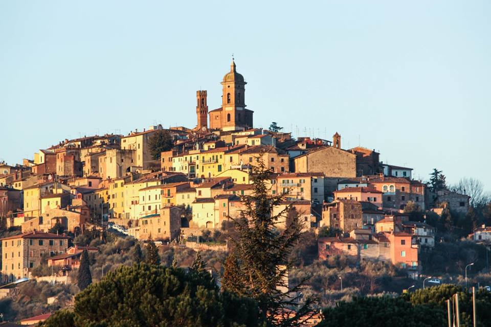 Veduta su Sinalunga